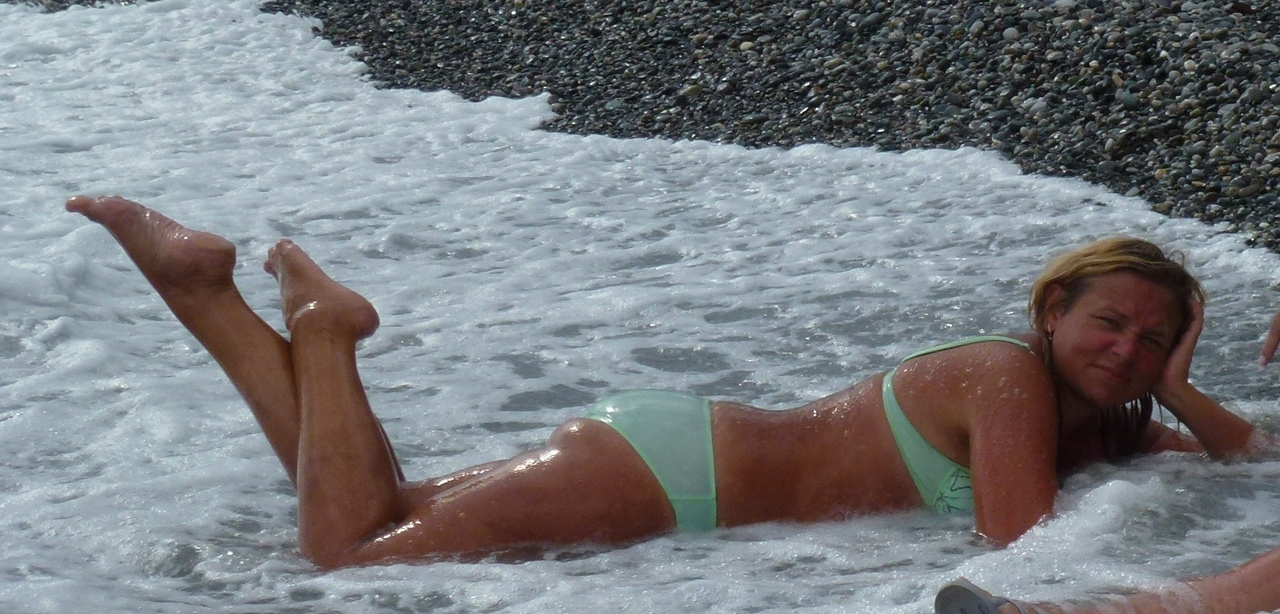 Галина Гайслер, педагог начальных классов. Фото сделано в Абхазии в 2012 году.